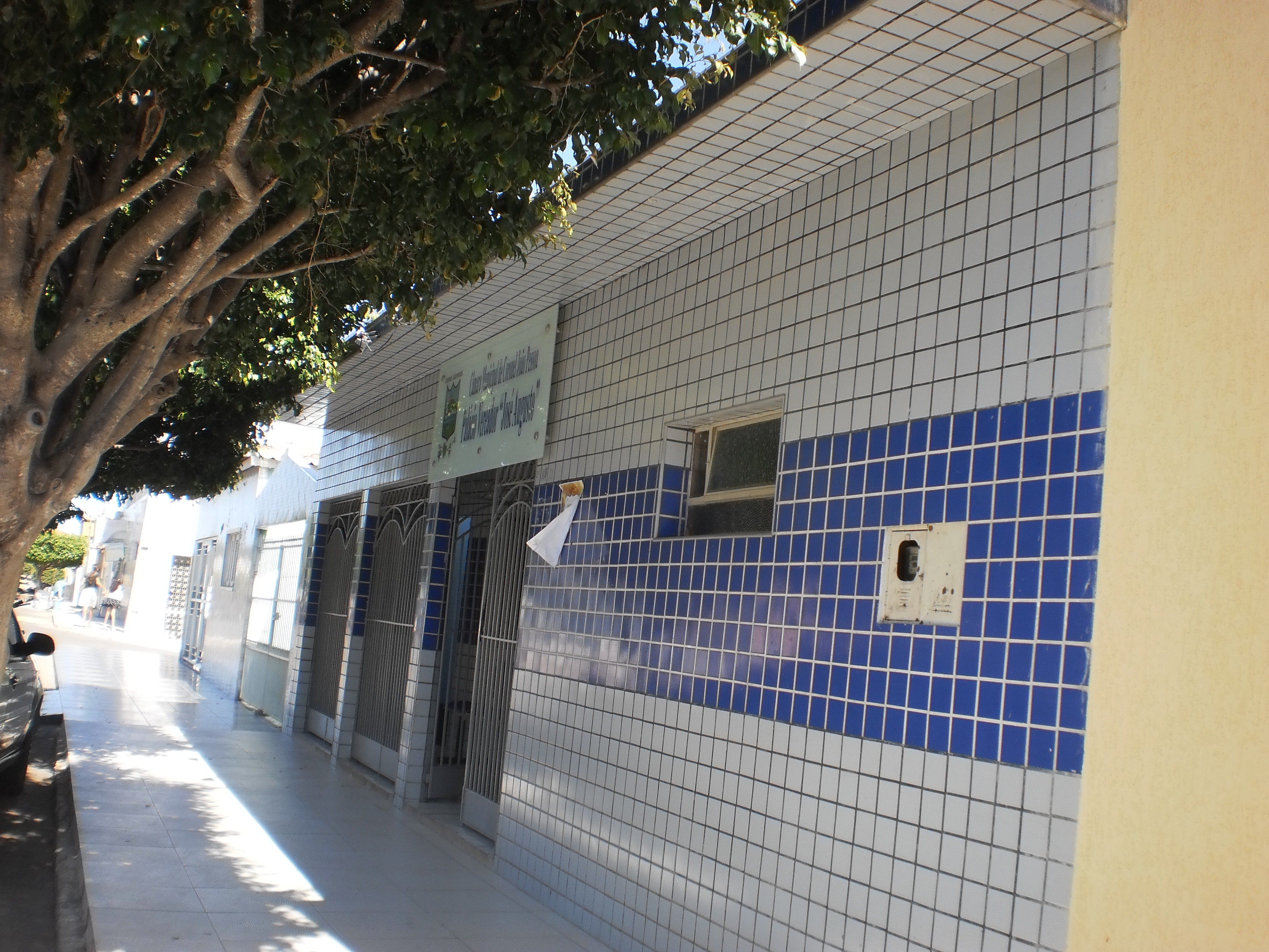 Palácio Vereador José Augusto, onde se situa a Câmara Municipal de Coronel João Pessoa, Rio Grande do Norte, Brasil.